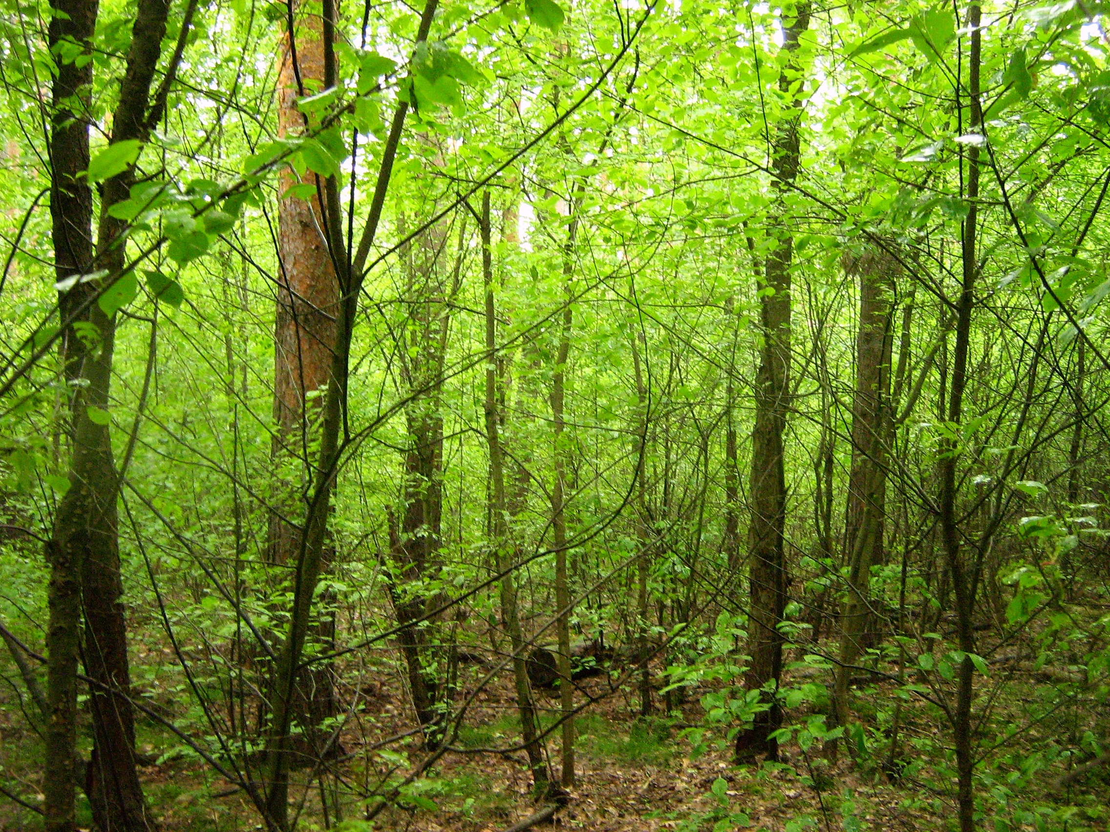 Spätblühende Traubenkirsche in den Ravensbergen in Potsdam.